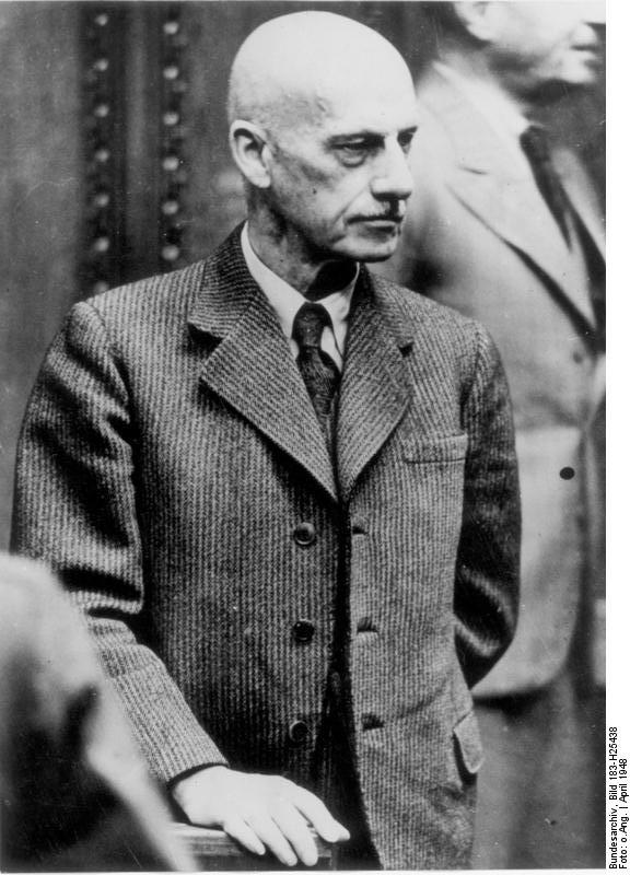 Zentralbild 11.9.1962 Nürnberger OKW-Prozess 48. Die Abschlussvernehmung des angeklagten ehemaligen Generalfeldmarschalls Wilhelm von Leeb im Nürnberger Prozess im April 1948. UBz: Der ehemalige Generalfeldmarschall Wilhelm von Ritter Leeb vor dem Nürnberger Gerichtshof.